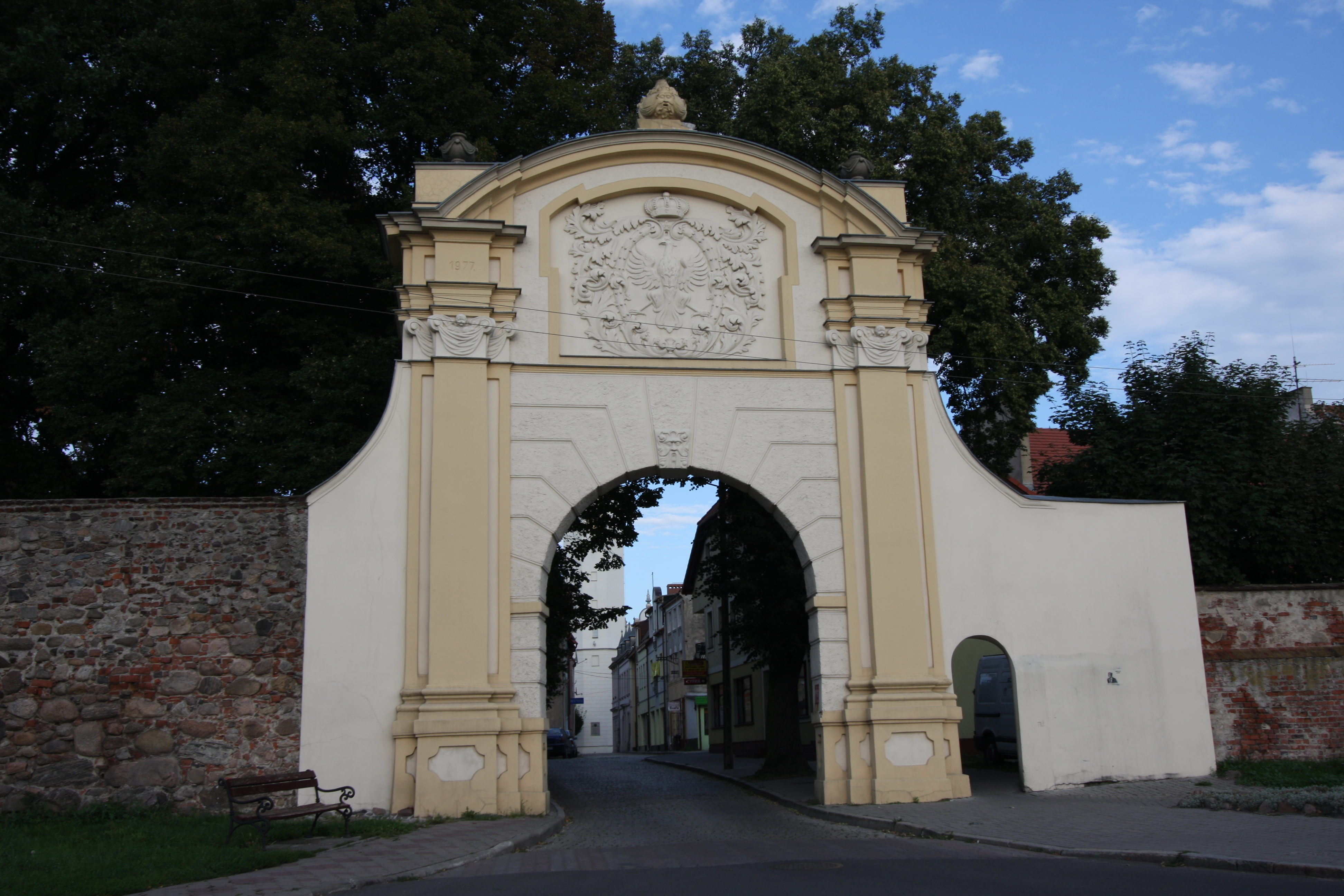 Sulechów, Brama Krośnieńska, w zespole pałacowym, mur.